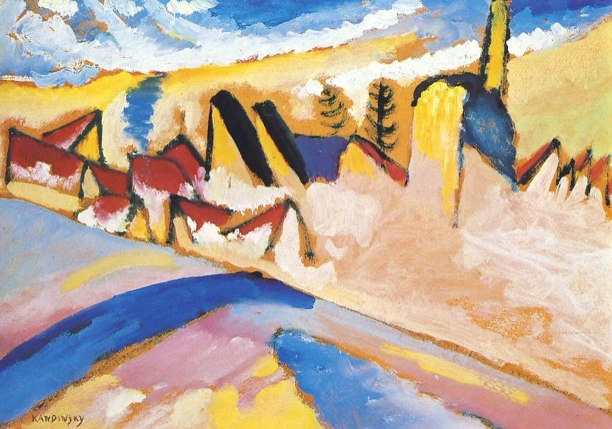 Wassily Kandinsky, Studie Winter II, Städtische Galerie im Lenbachhaus